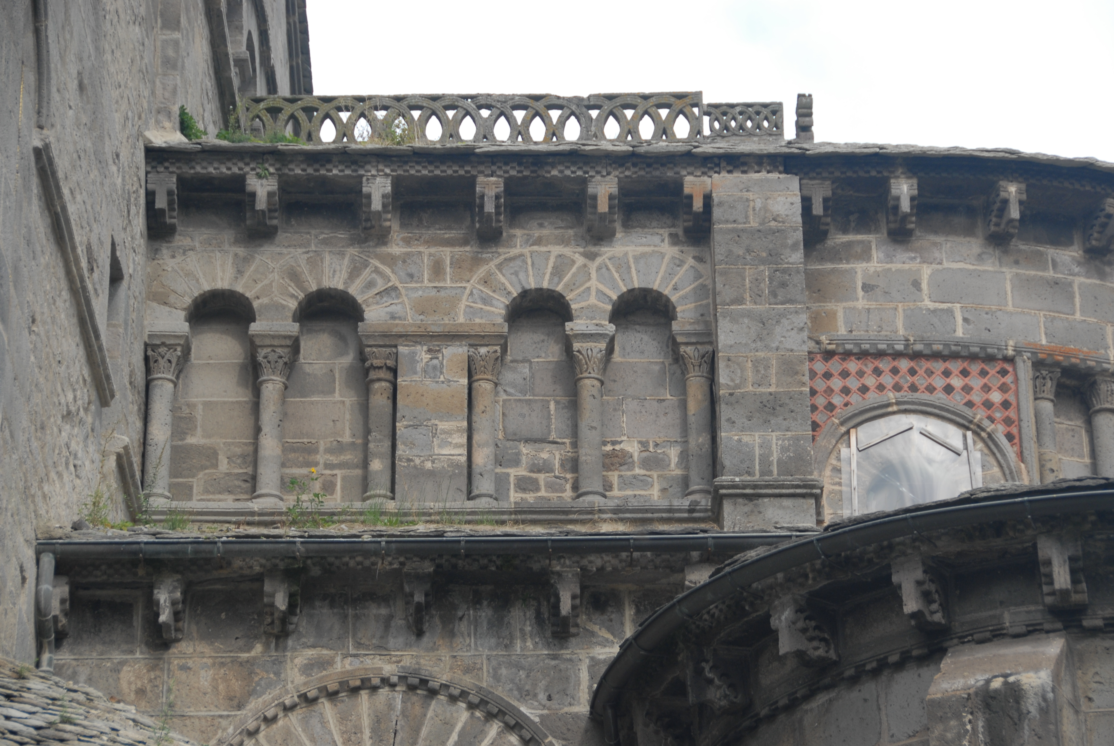 N.-D. d'Orcival, Chorjoch von S